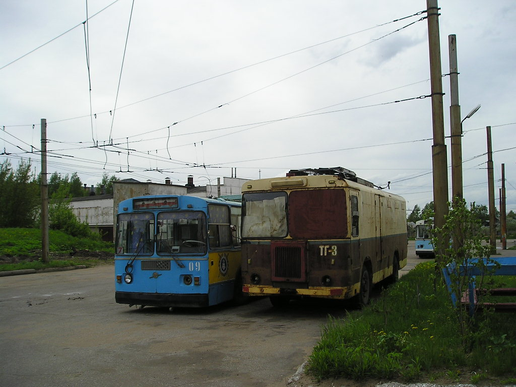 Списка